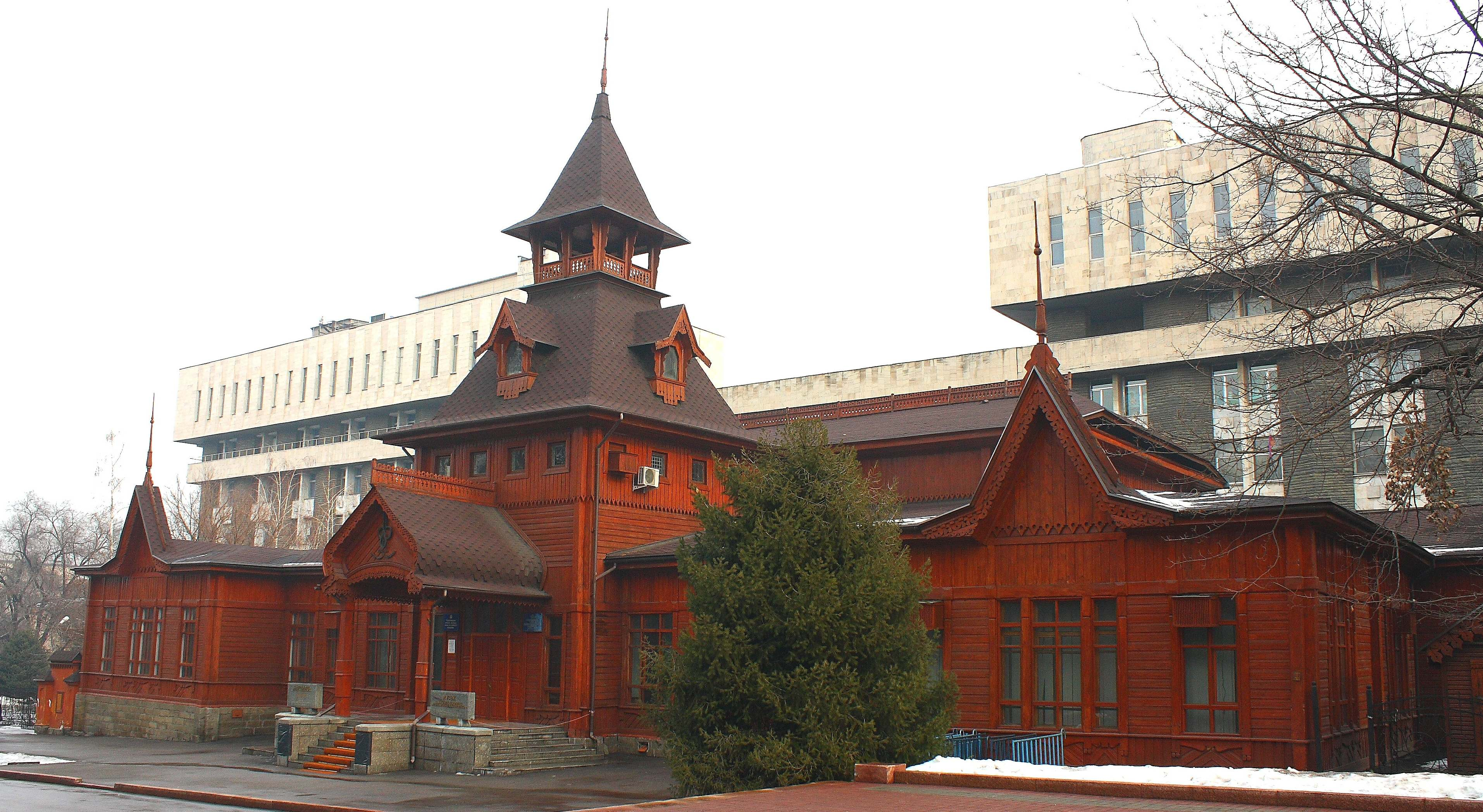 Алма-Ата, Казахстан. Здание Музея народных музыкальных инструментов имени Ыкыласа (бывший дом офицерского собрания). Построено в 1908 году